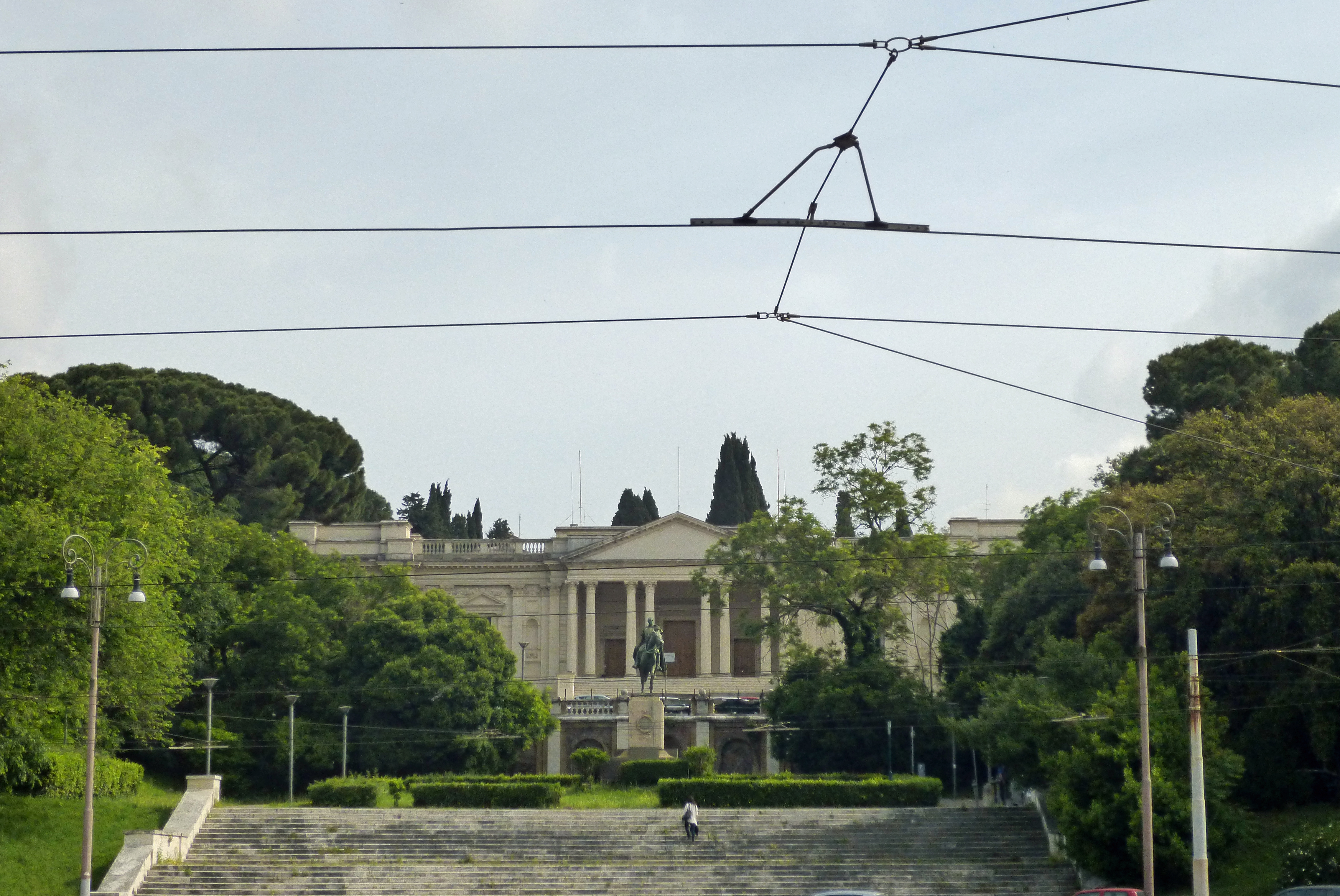 Roma, British School at Rome, dalla scalinata Bruno Zevi.